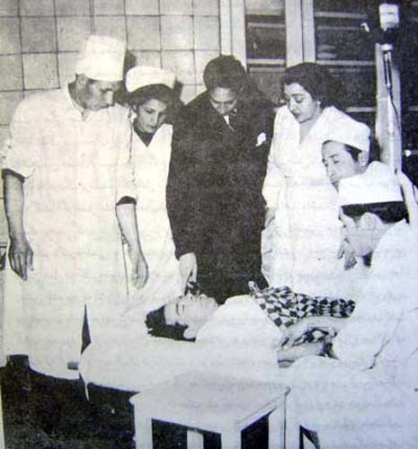 دكتر فاطمی معاون نخست وزير پس از ترور نافرجام در بيمارستان ۲۵ بهمن۱۳۳۰